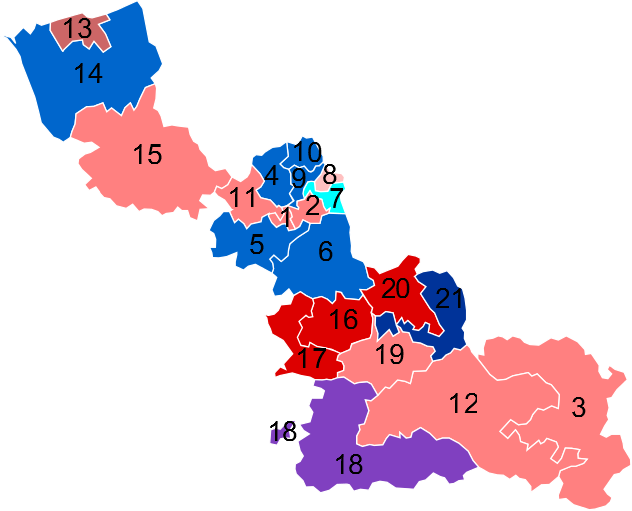 Résultats des élections législatives du Nord en 2012